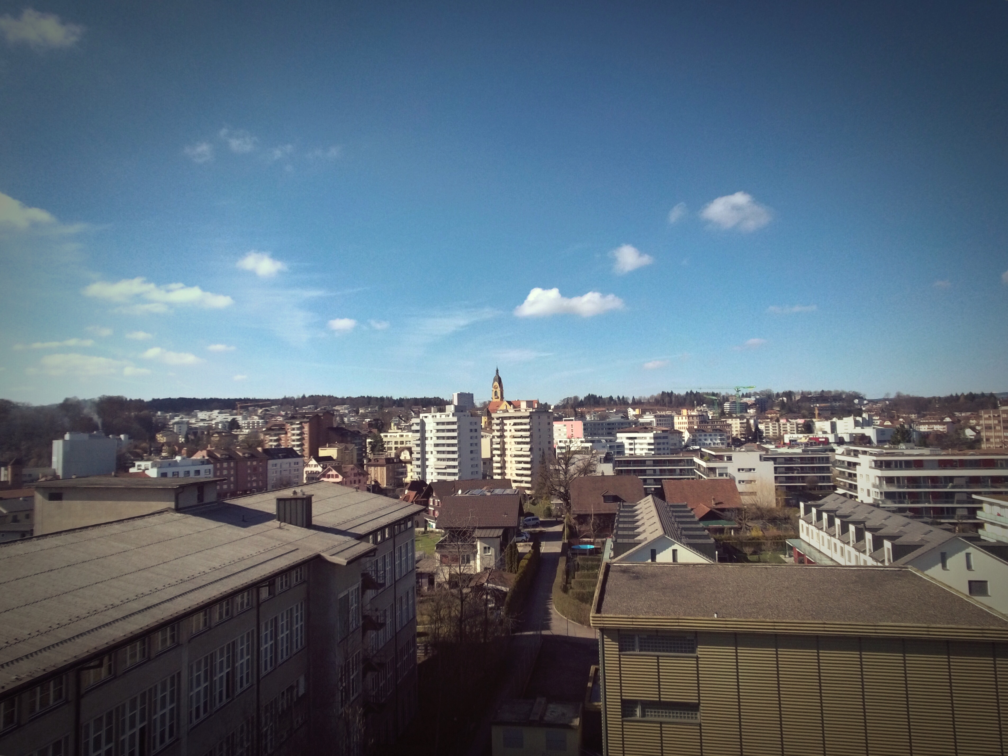 Blick, Richtung Norden, über Emmenbrücke.